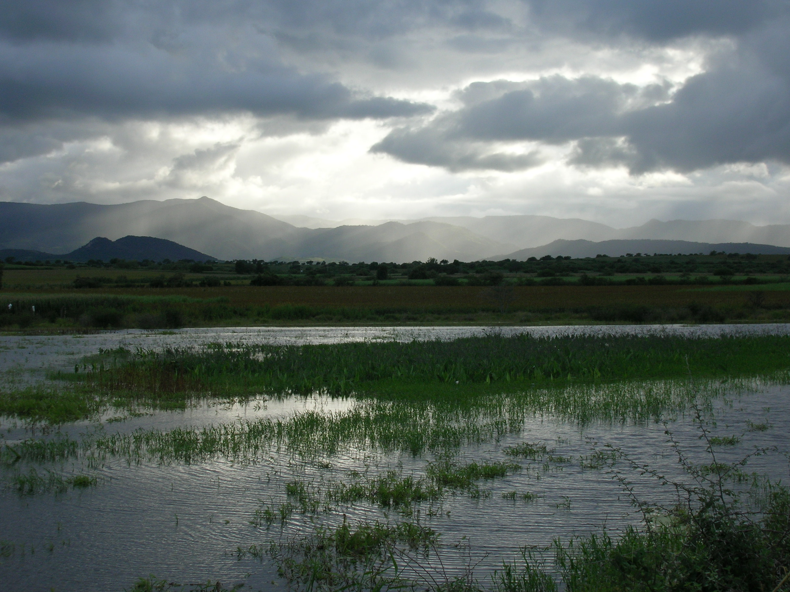 Plantío de sorgo y caña a orilla de las Tusas